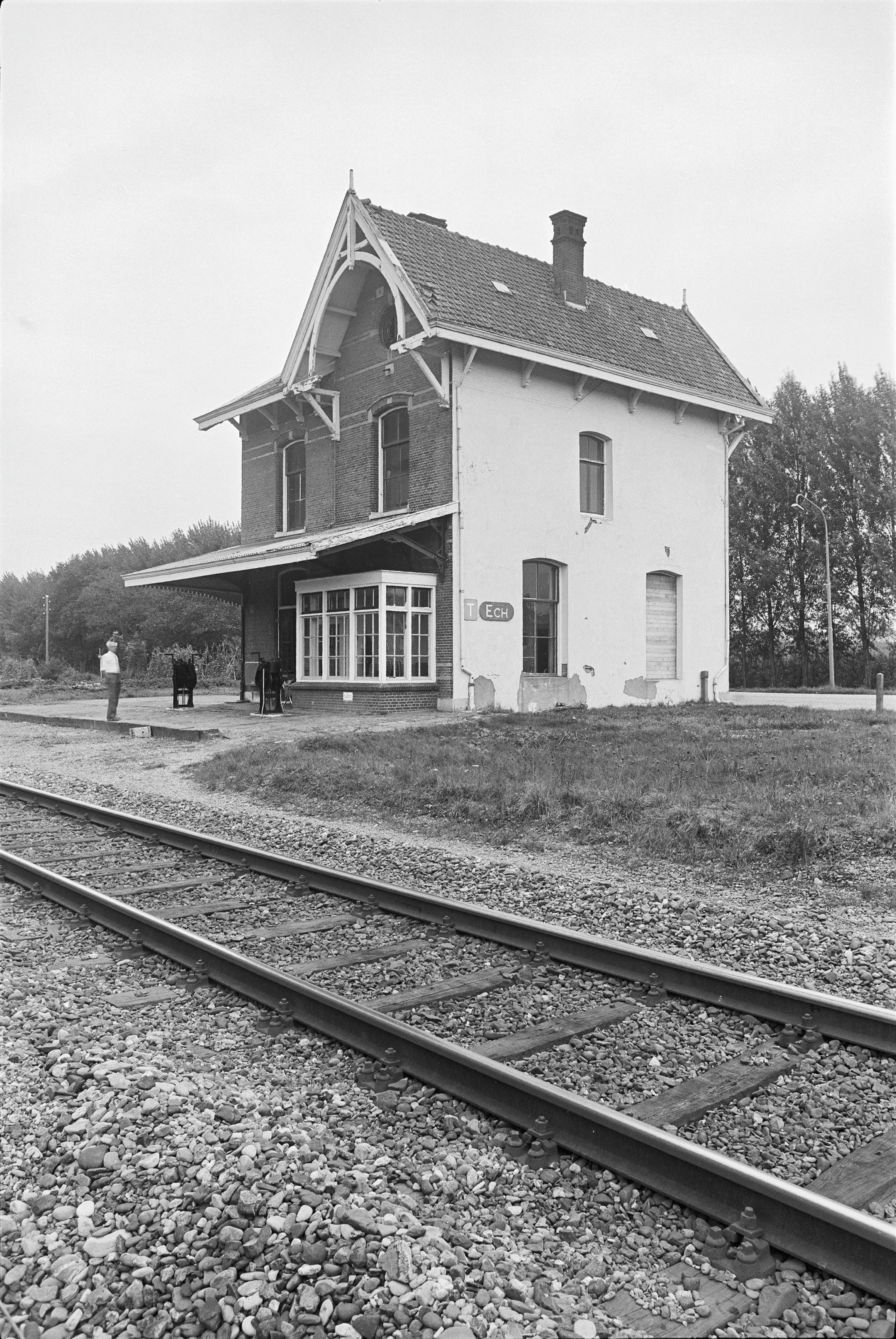 Station: gevel perronzijde